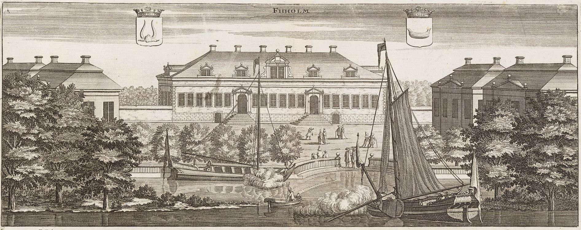 Fiiholm, Hanstawiik